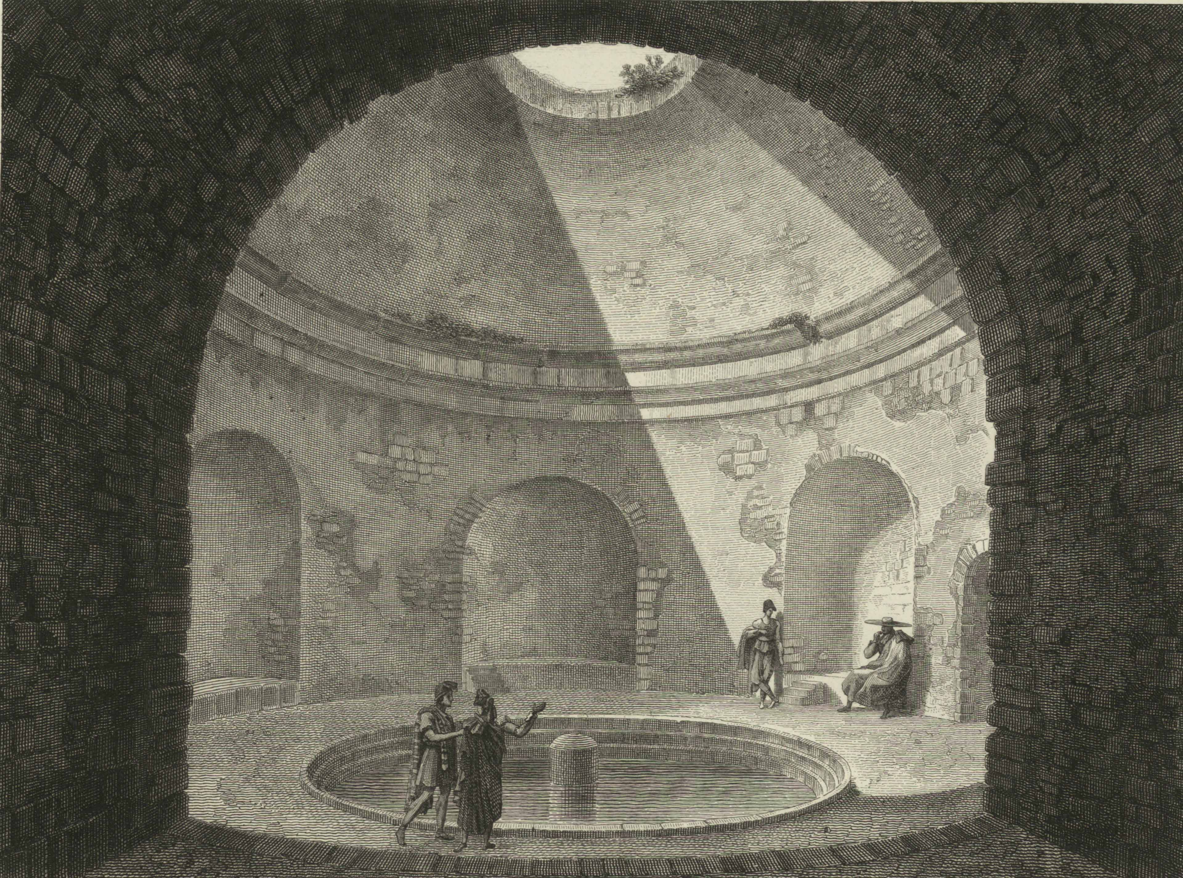 Baños de Alhange. Plano de los baños de Alhange.